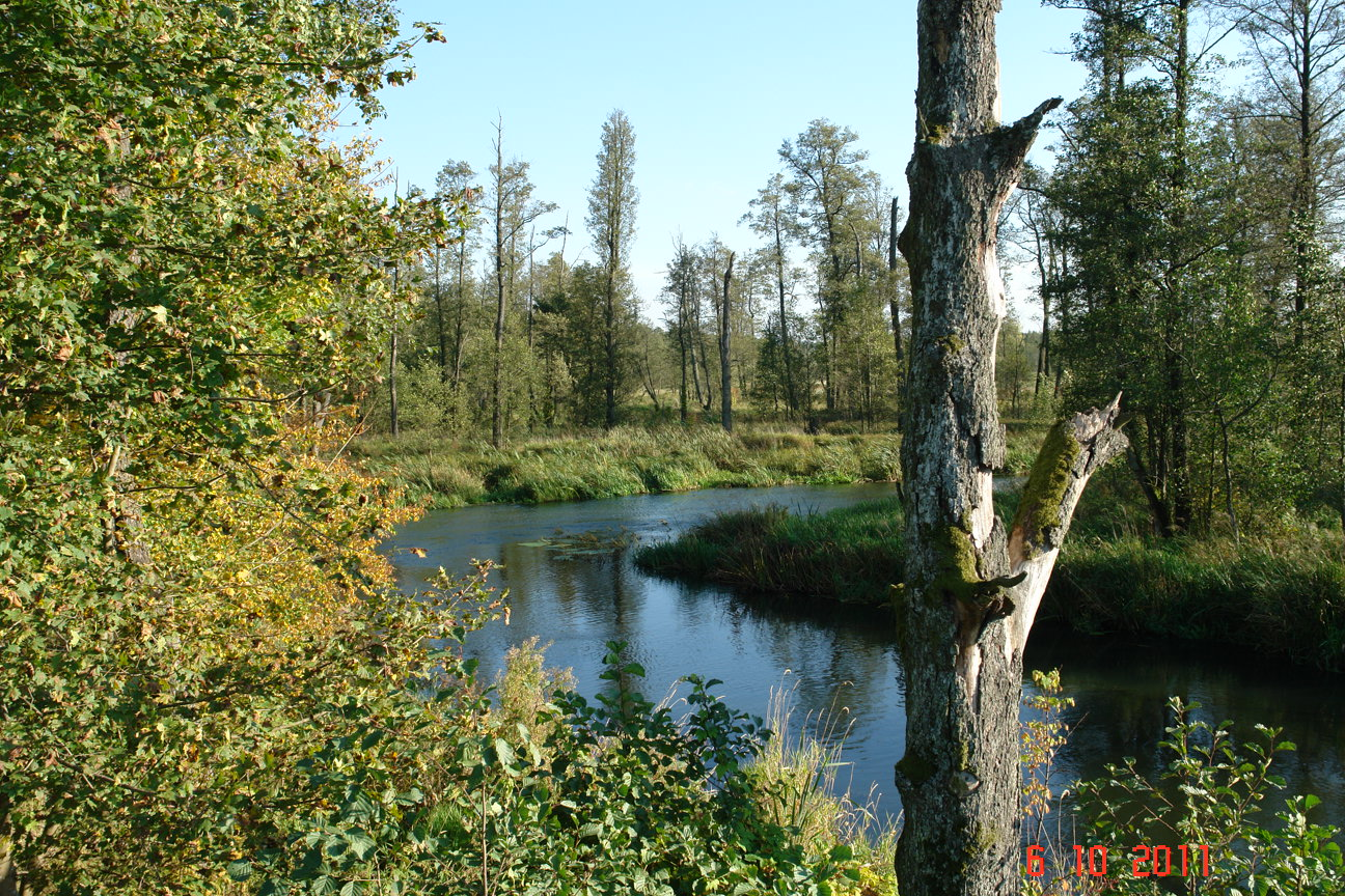 Górna woda przy MEW Kasztanowo.